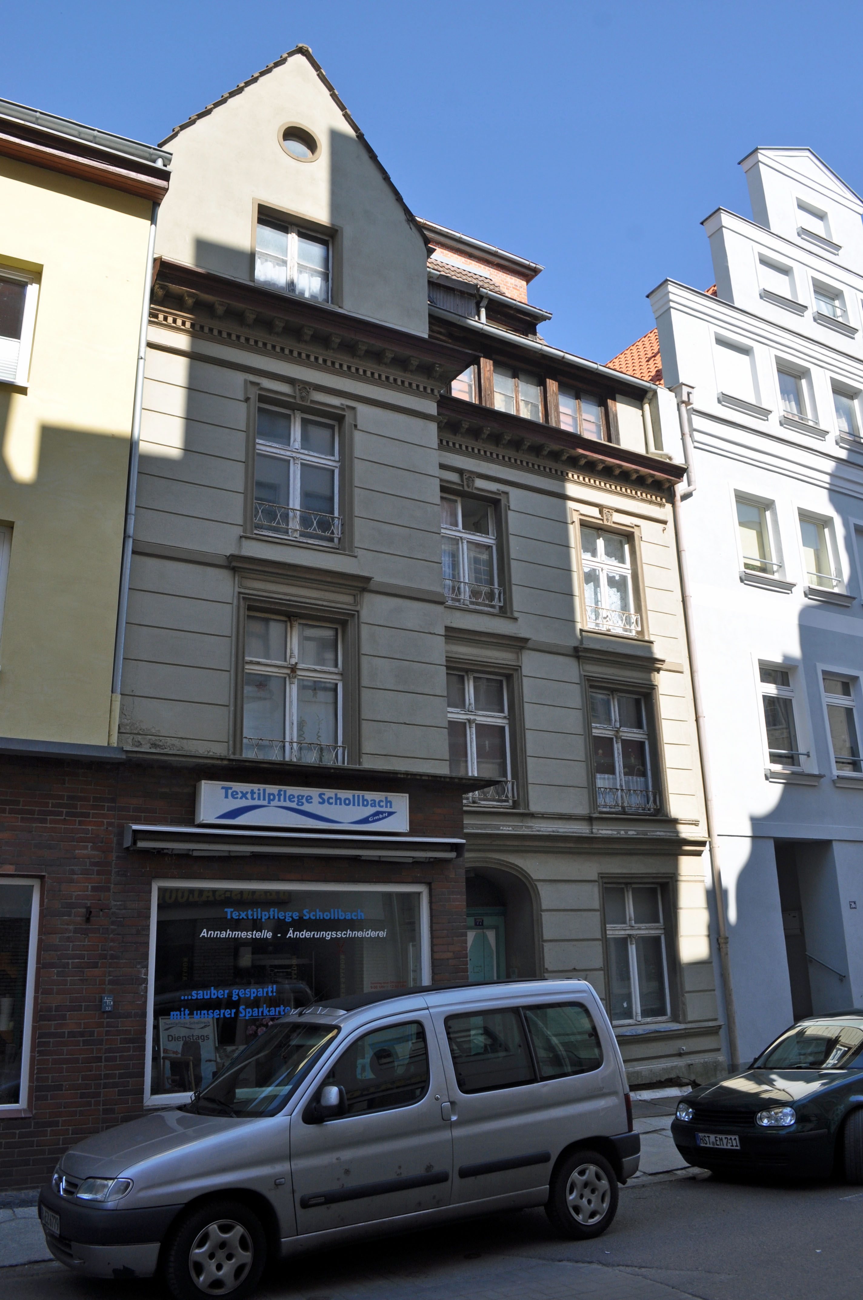 Gebäude bzw. Gebäudedetail in Stralsund. Straße und Hausnummer siehe Dateiname.